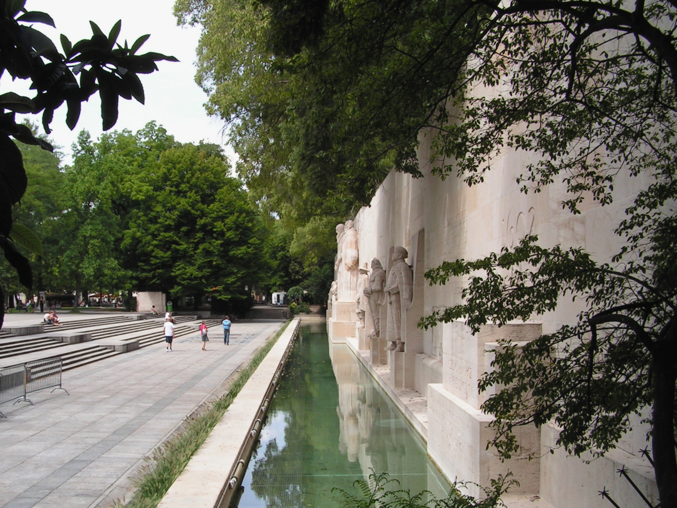 Genève. Parc des Bastions. Le mur des Réformateurs.